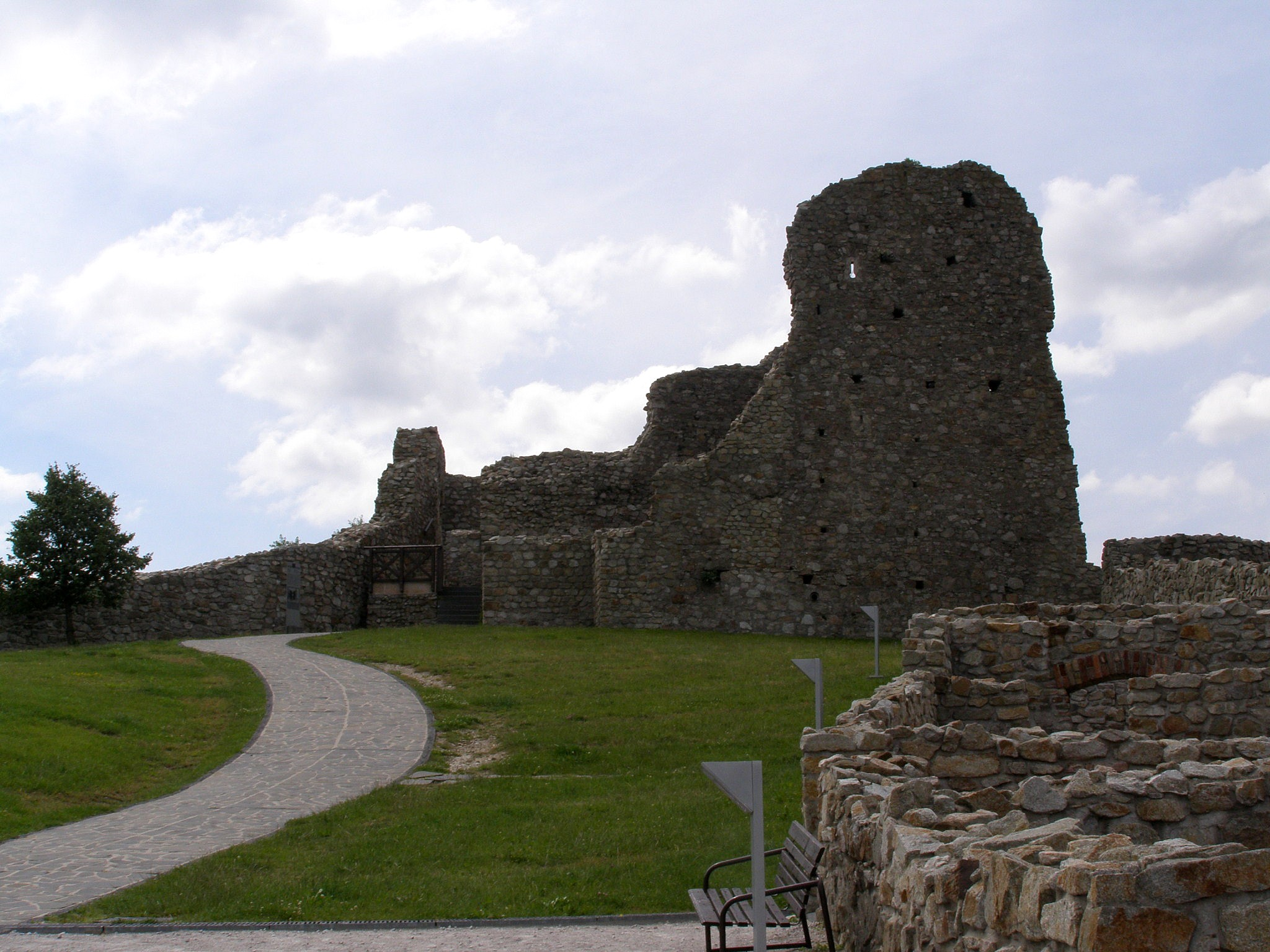 Celkový pohľad na gotický obytný palác Garayovcov zo začiatku 15. storočia